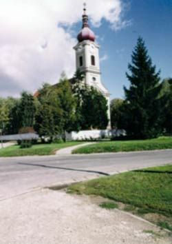 Jedna z najnovsich fotografii kostola v obci